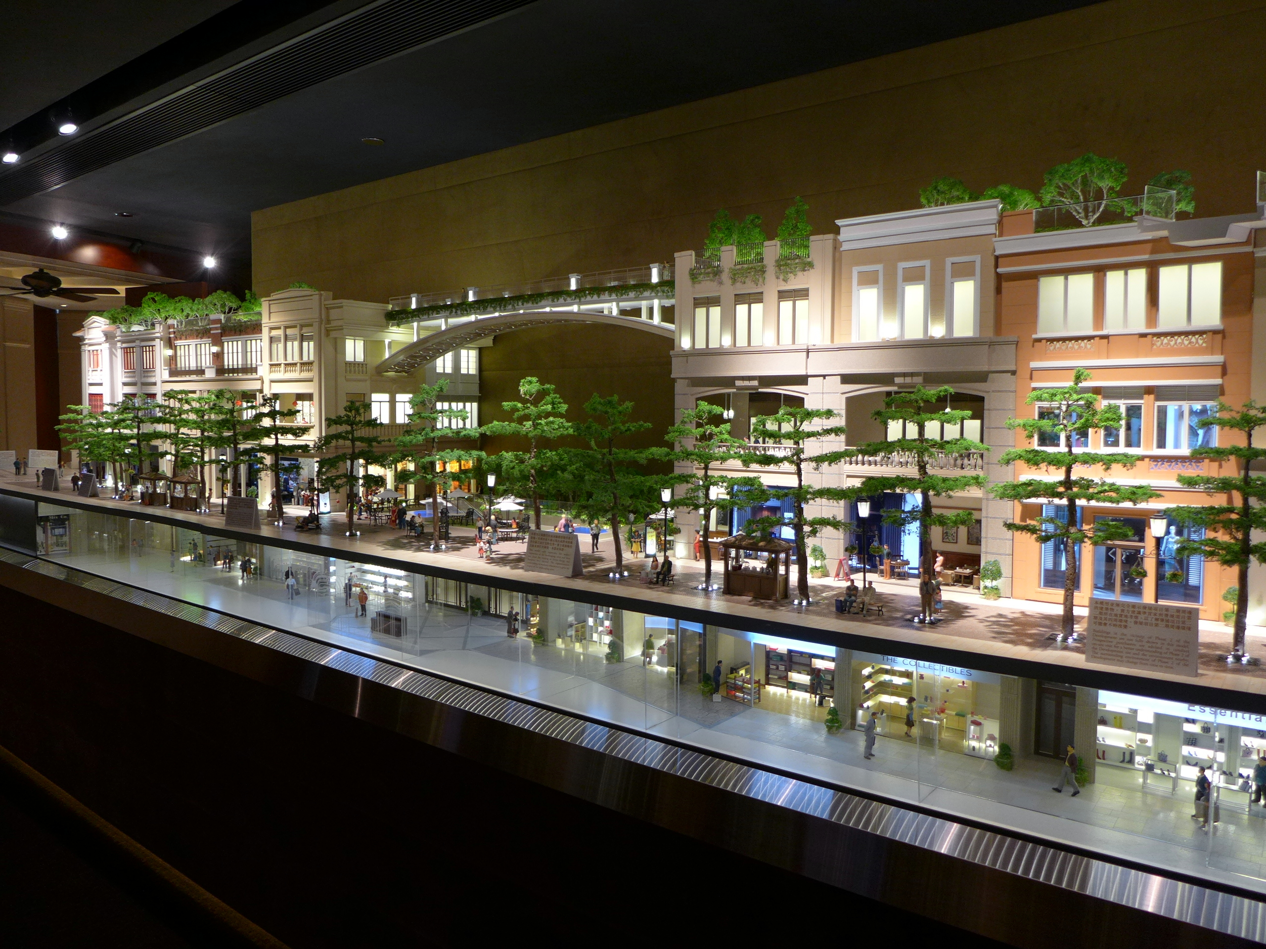 Avenue Walk Model